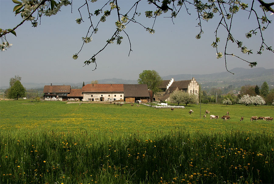 Ritterhaus in Bubikon, von Westen her gesehen